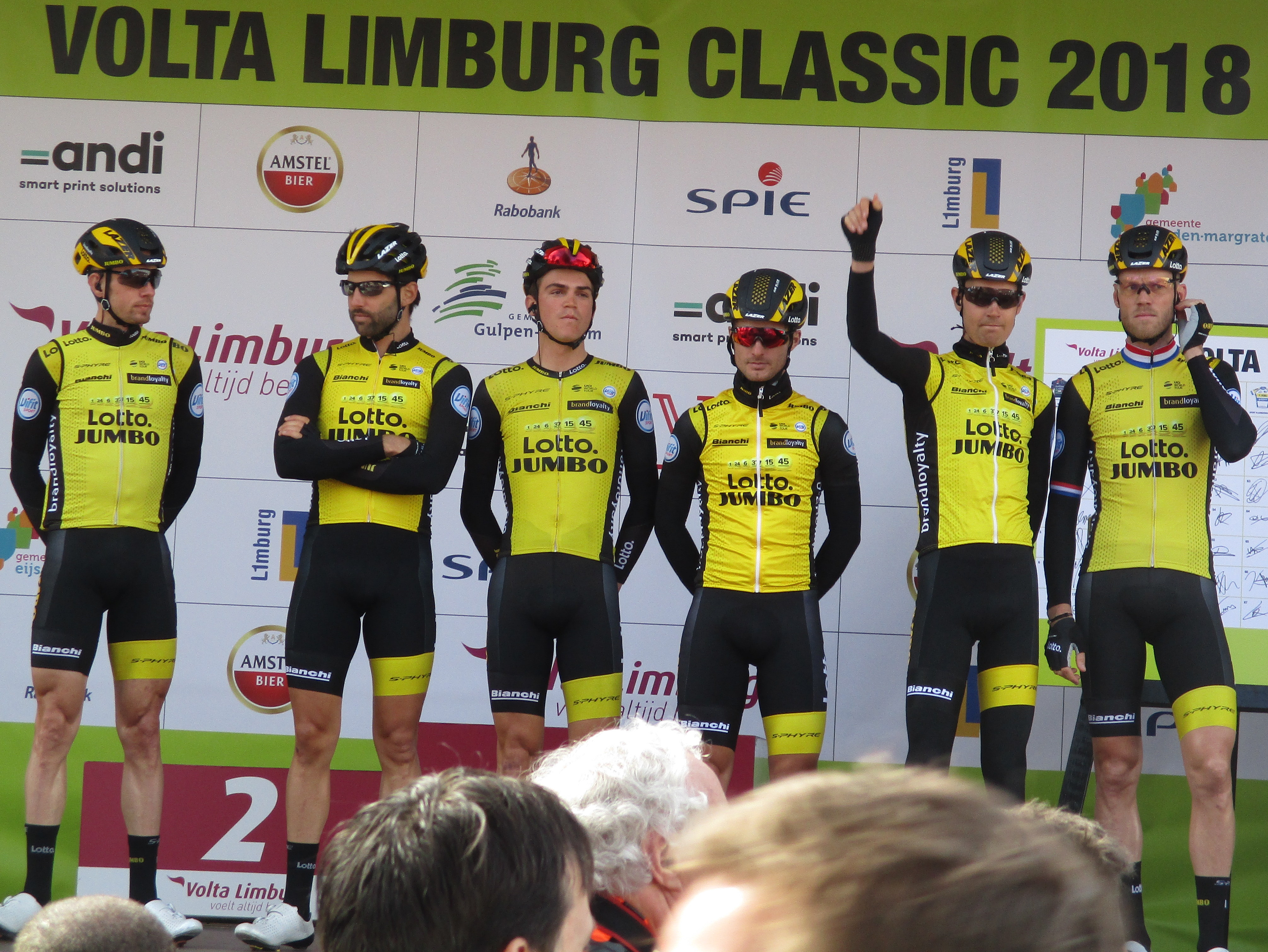 Start van de Volta Limburg Classic 2018 in de Diepstraat in Eijsden